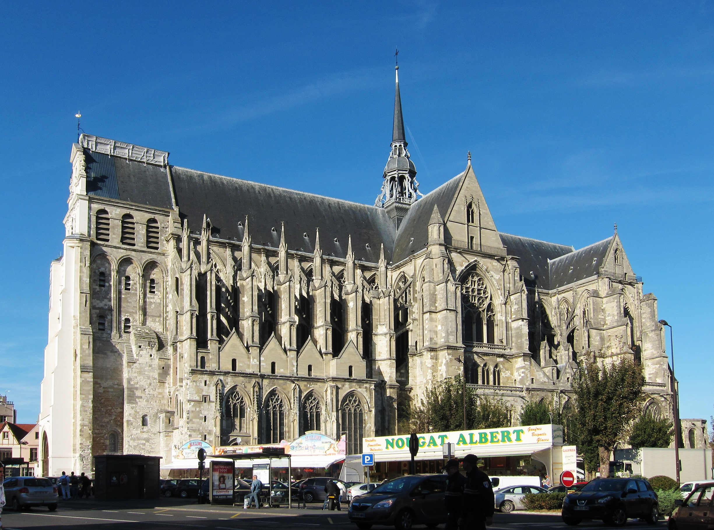 La Basilique Saint-Quentin de Saint-Quentin (Aisne).